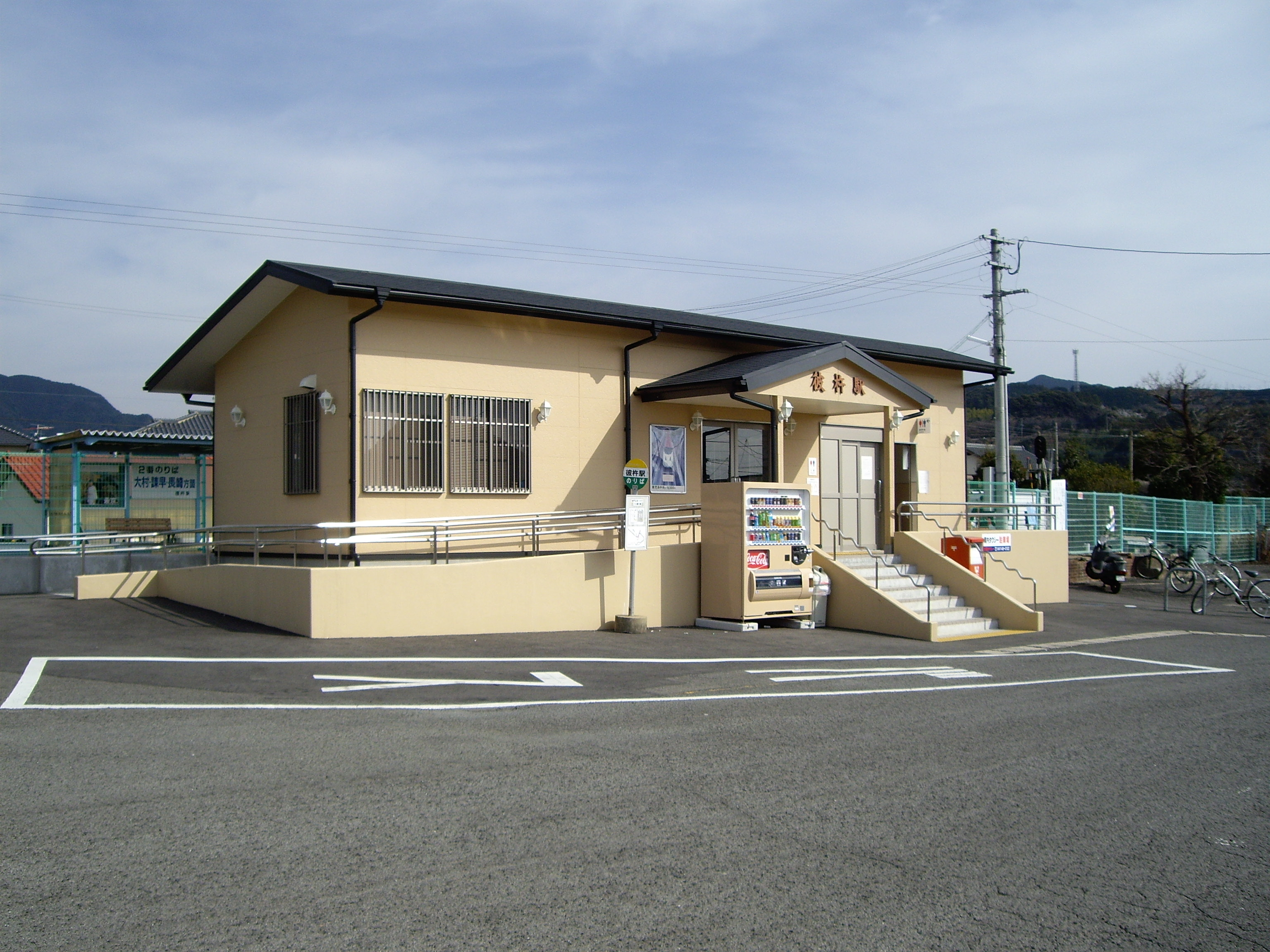 Sonogi Station(彼杵駅)